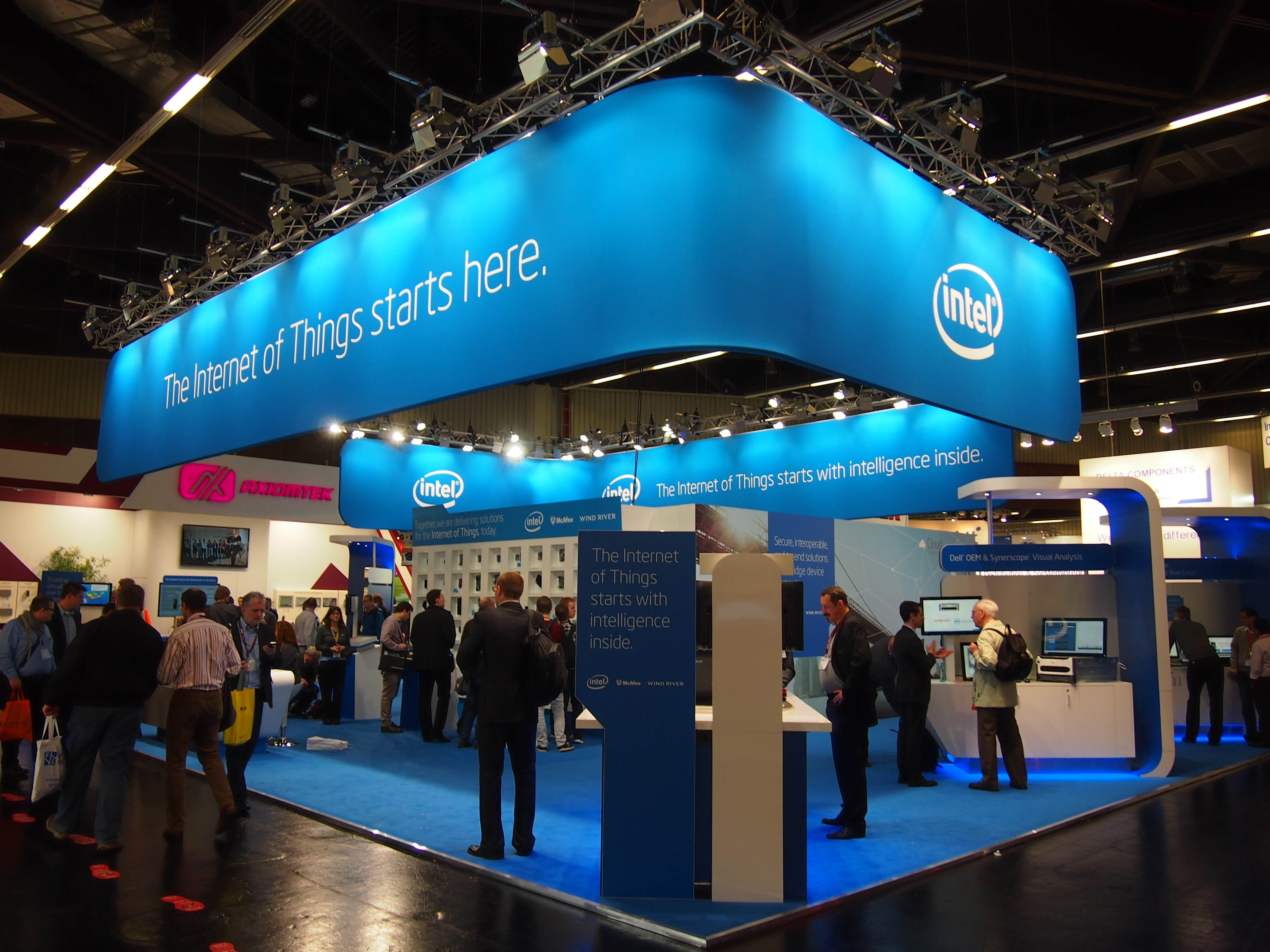 Embedded World 2014: Intel Stand mit "Internet of Things" (IoT)